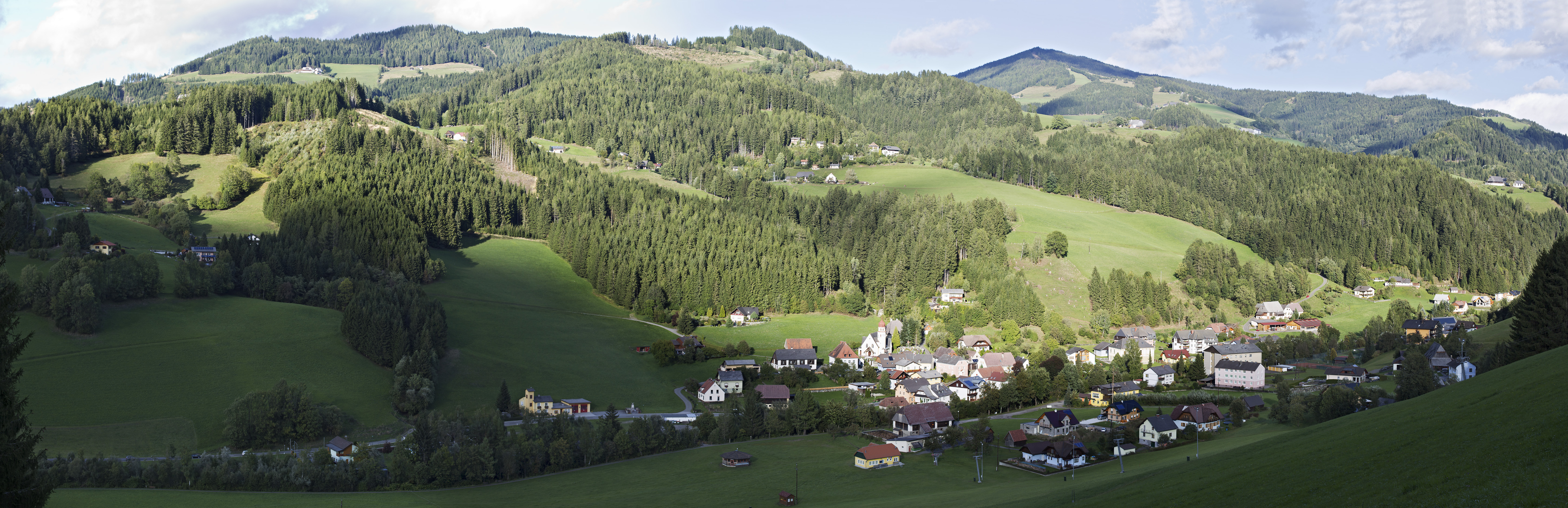 Blick auf Kleinlobming